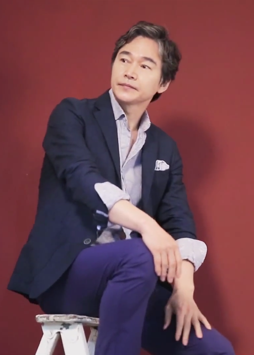 [씬플레이빌] 5월호 정보석 박은석